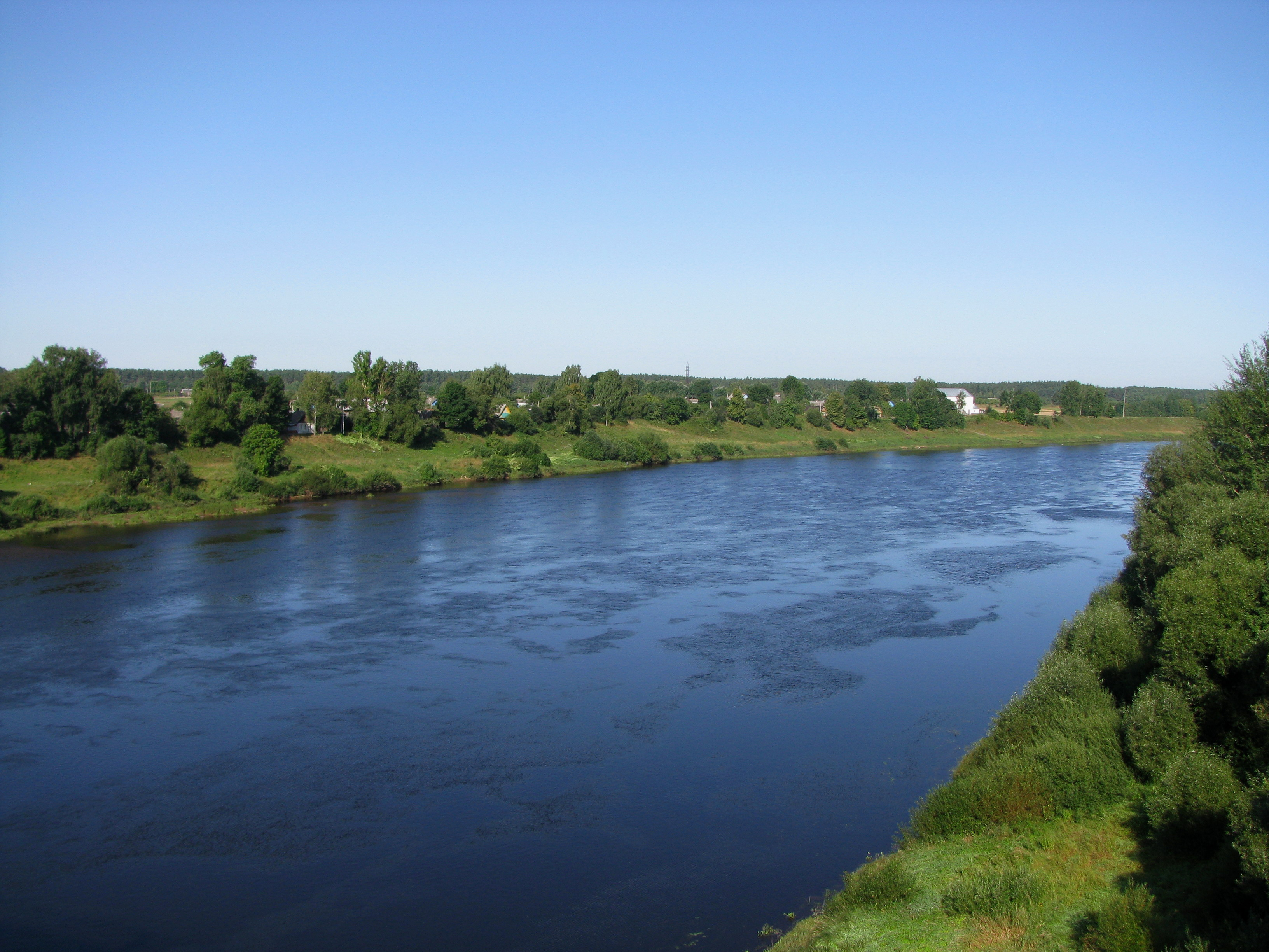 Западная Двина в г.п. Улла